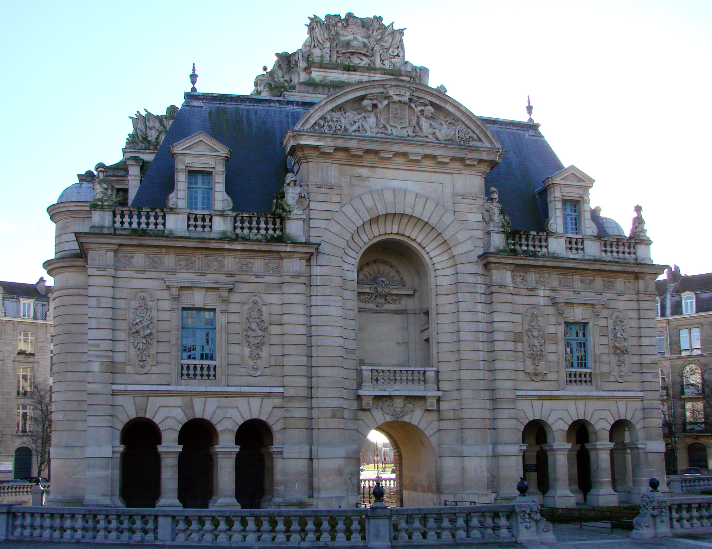 la Porte de Paris à Lille (construction: 1685-1692) vue de l'arrière (côté ville).